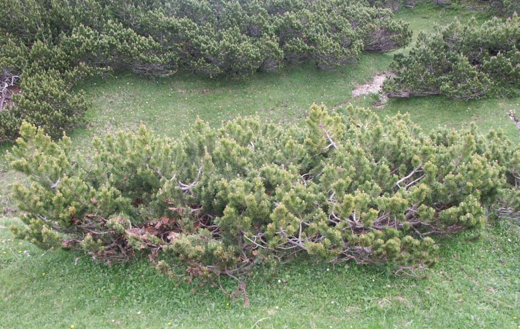 Latsche Fundort: Nähe Liezener Hütte, Wörschach, Steiermark, Österreich